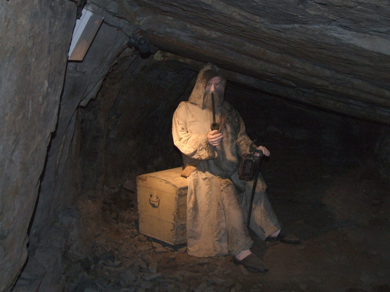 Subterranean skansen Guido in Zabrze - underground manekeen of Karzełek